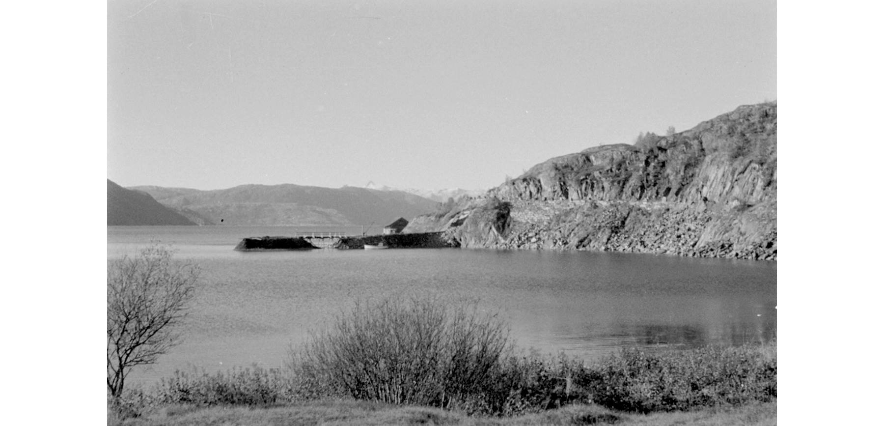 Opprinnelig var kaiet i Holandsvika et lokalt transportknutepunkt, der lokalbåten la til. Senere ble det omgjort til mottaksterminal for oljeselskapet BP, og senere overtatt av Statoil.